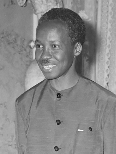 Staatsbezoek van president Julius Nyerere van Tanzania aan Nederland. Koningin Juliana, president Nyerere en prins Bernhard op paleis Soestdijk 21 april 1965